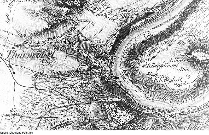 Original image description from the Deutsche Fotothek Struppen-Thürmsdorf. Oberreit, Sect. Stolpen, 1821/22